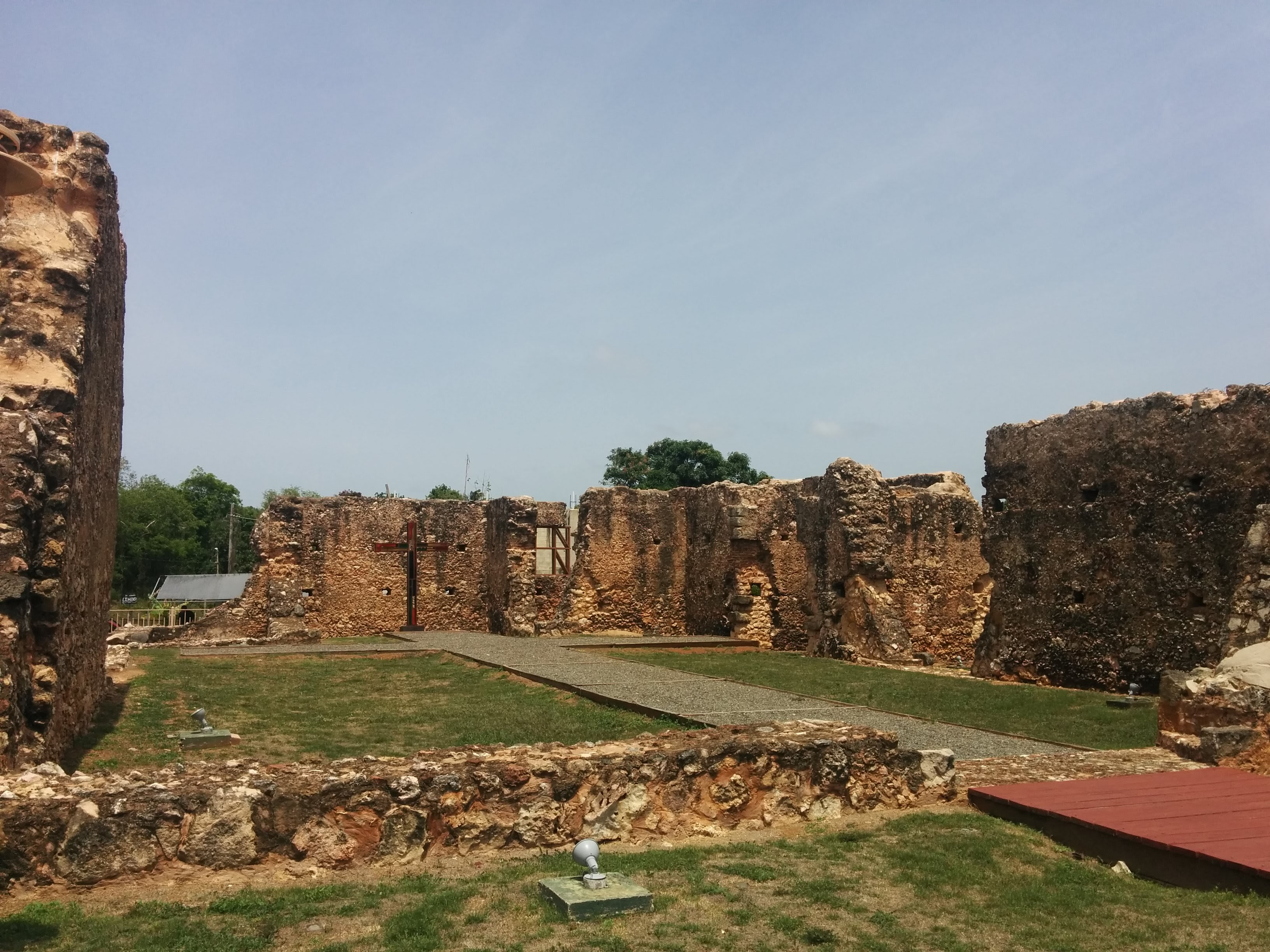 Ermita San Antonio de Padua